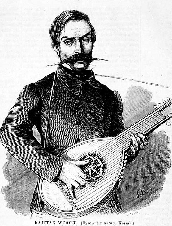 Каєтан Відорт - музика.